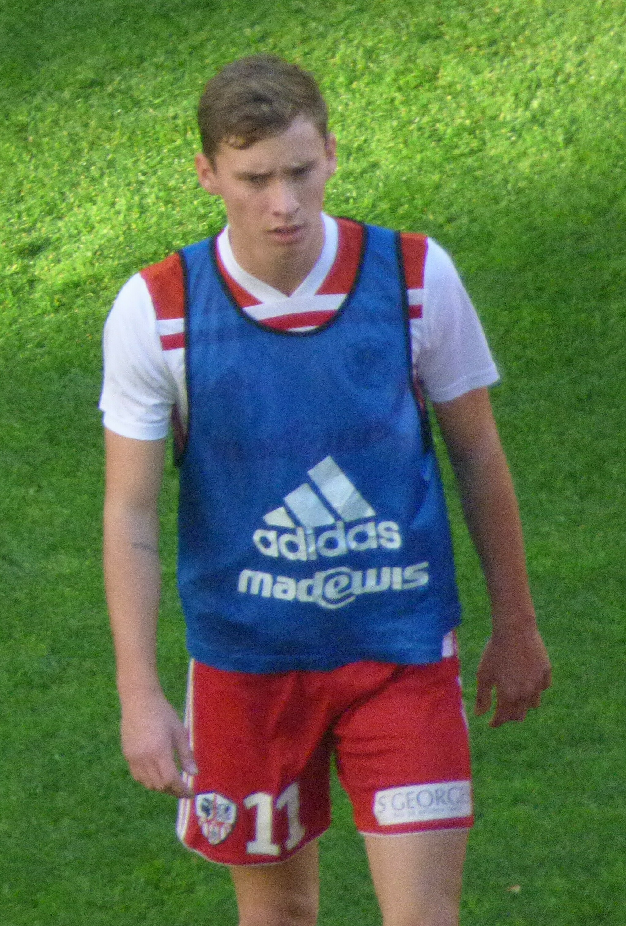 Matteo Tramoni avant le match RC Lens - AC Ajaccio, comptant pour la dix-neuvième journée du championnat de France de Ligue 2 2018-2019, le 22 décembre 2018, au Stade Bollaert-Delelis de Lens.